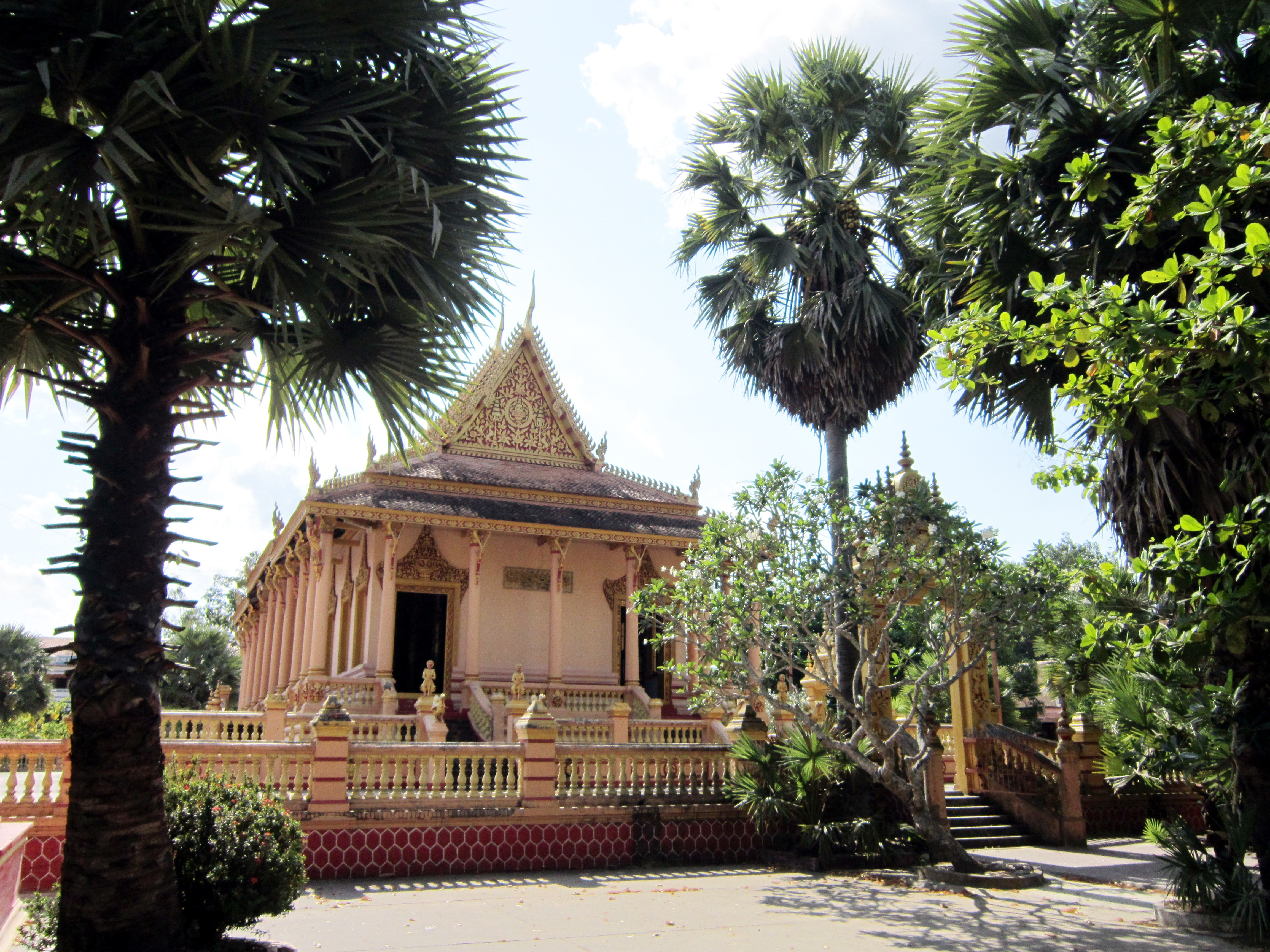 Chùa Khléang là một ngôi chùa cổ trong hệ thống chùa Khmer ở Nam Bộ; hiện tọa lạc ở số 53 đường Tôn Đức Thắng, thuộc phường 6, thành phố Sóc Trăng, tỉnh Sóc Trăng, Việt Nam.